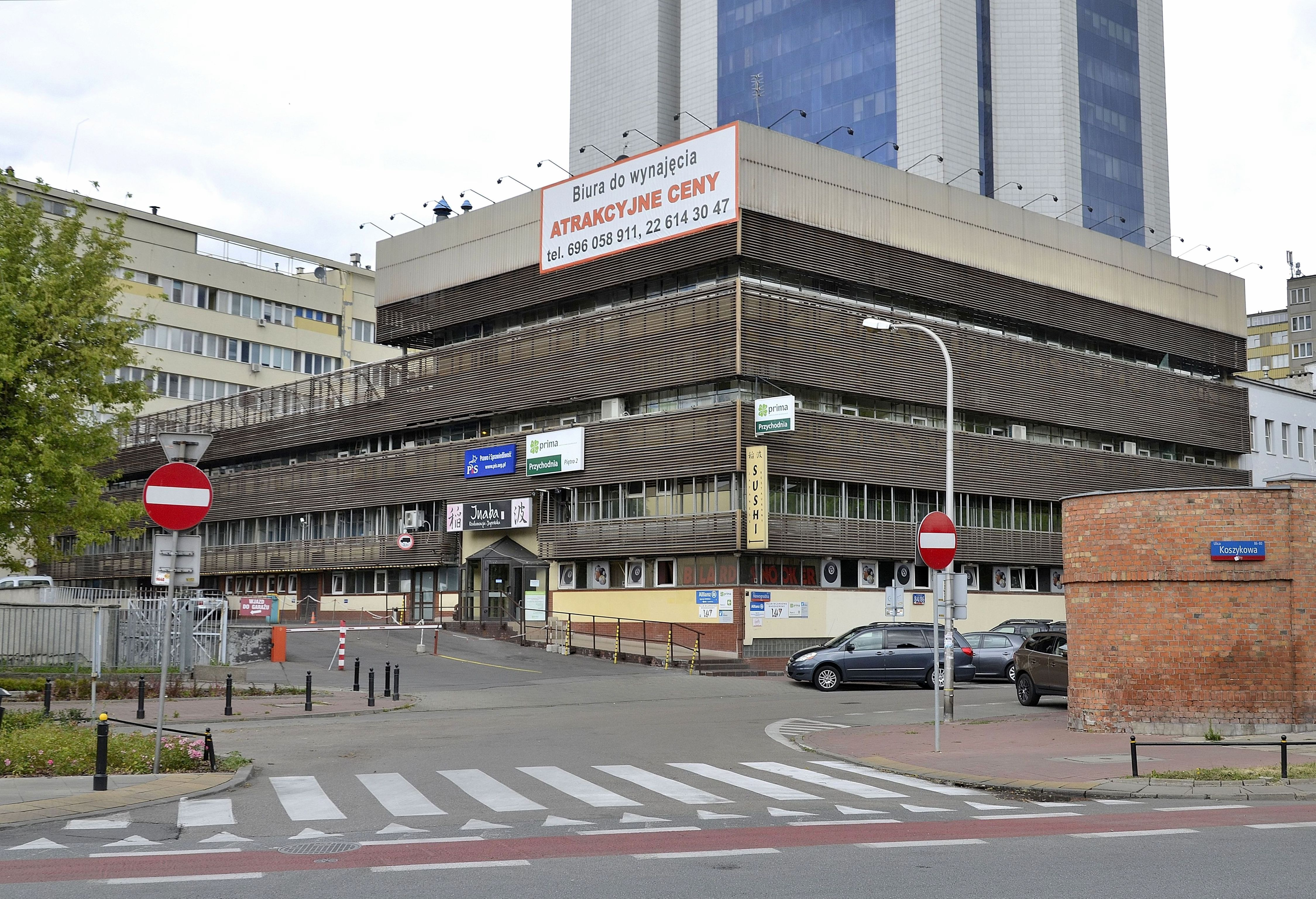 Budynek przy ul. Nowogrodzkiej 84/86 w Warszawie